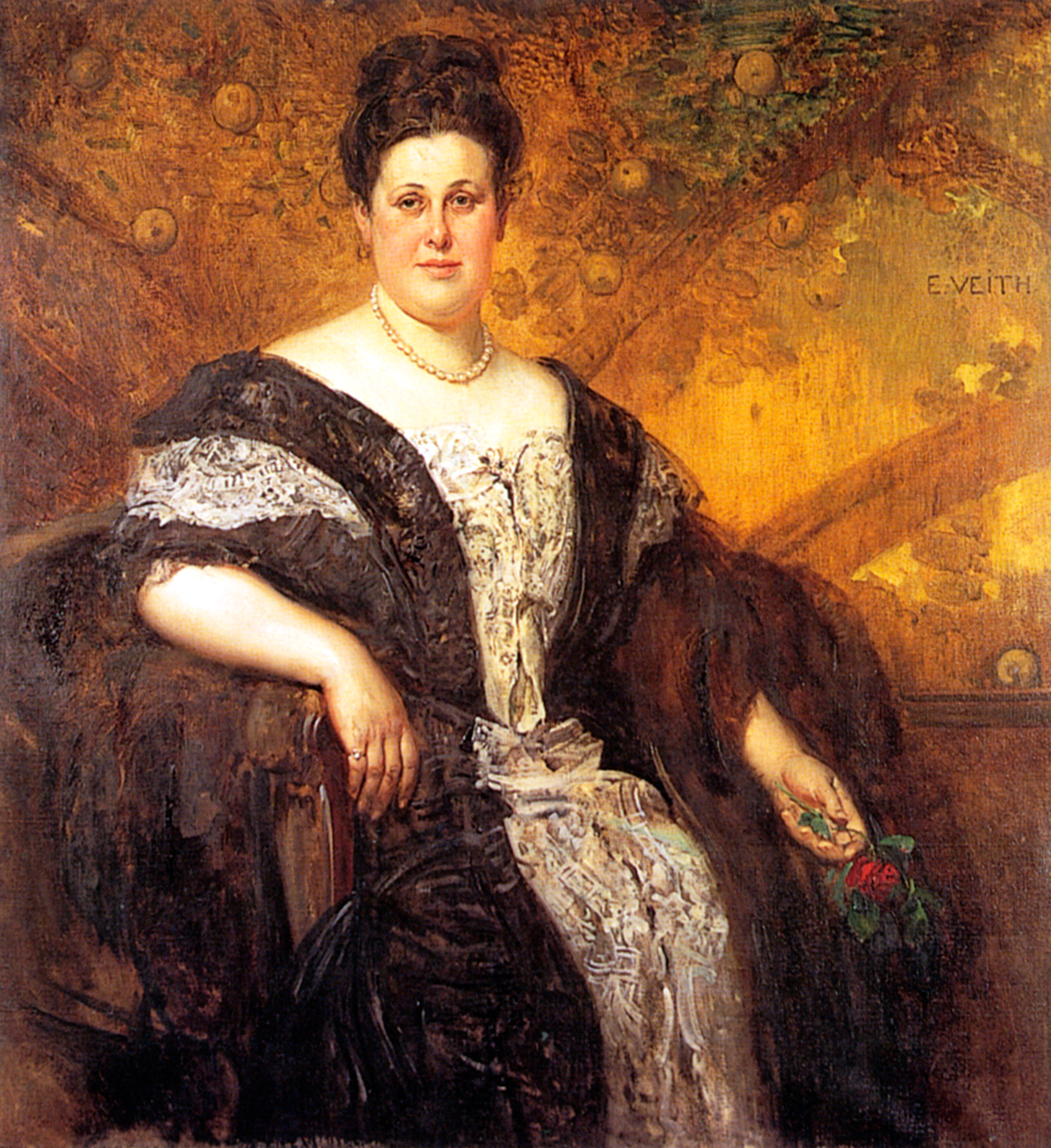 Ida von Gutmann-Wodianer (1847–1924)